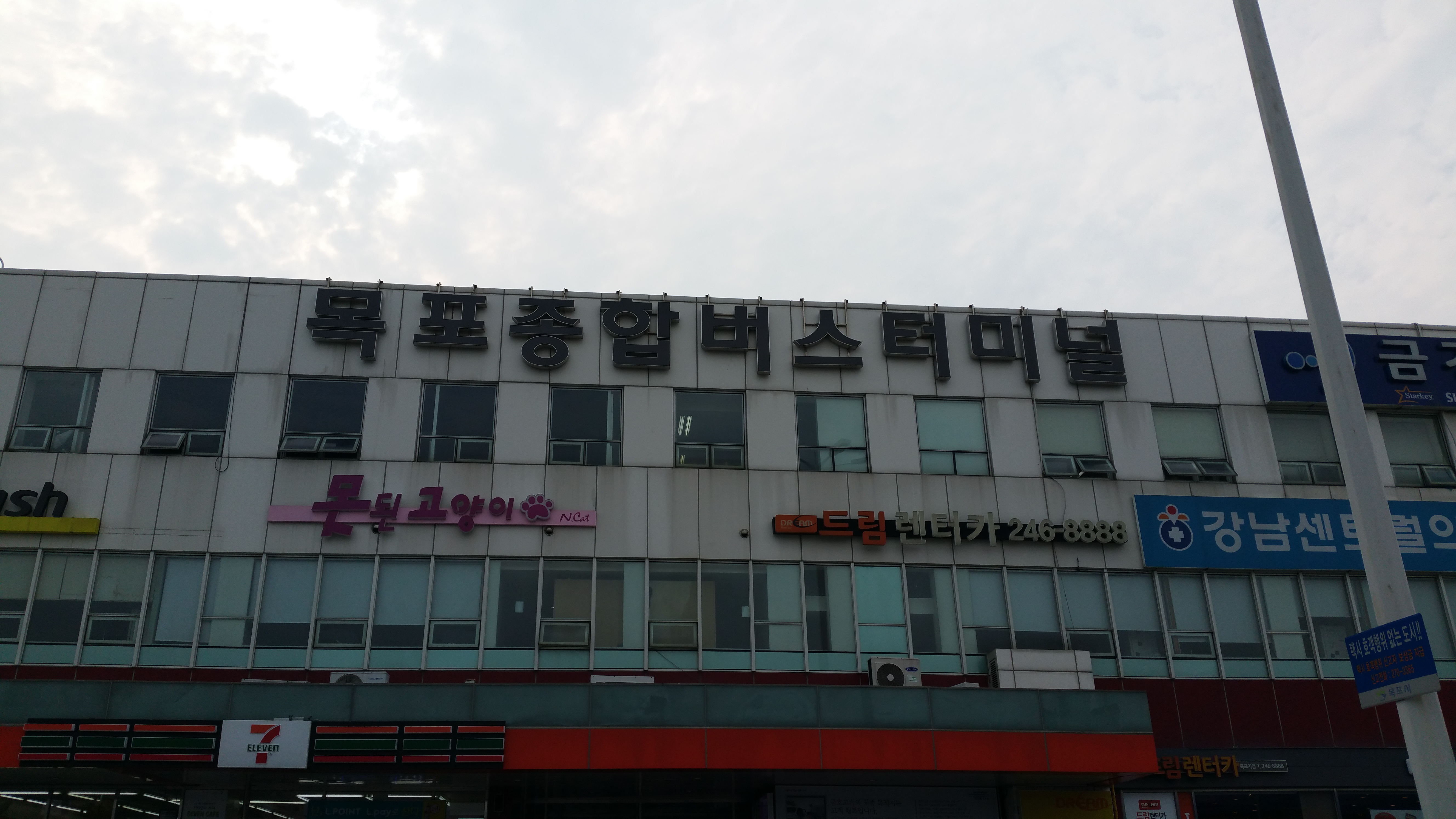 2017년 6월 24일에 촬영된 목포종합버스터미널